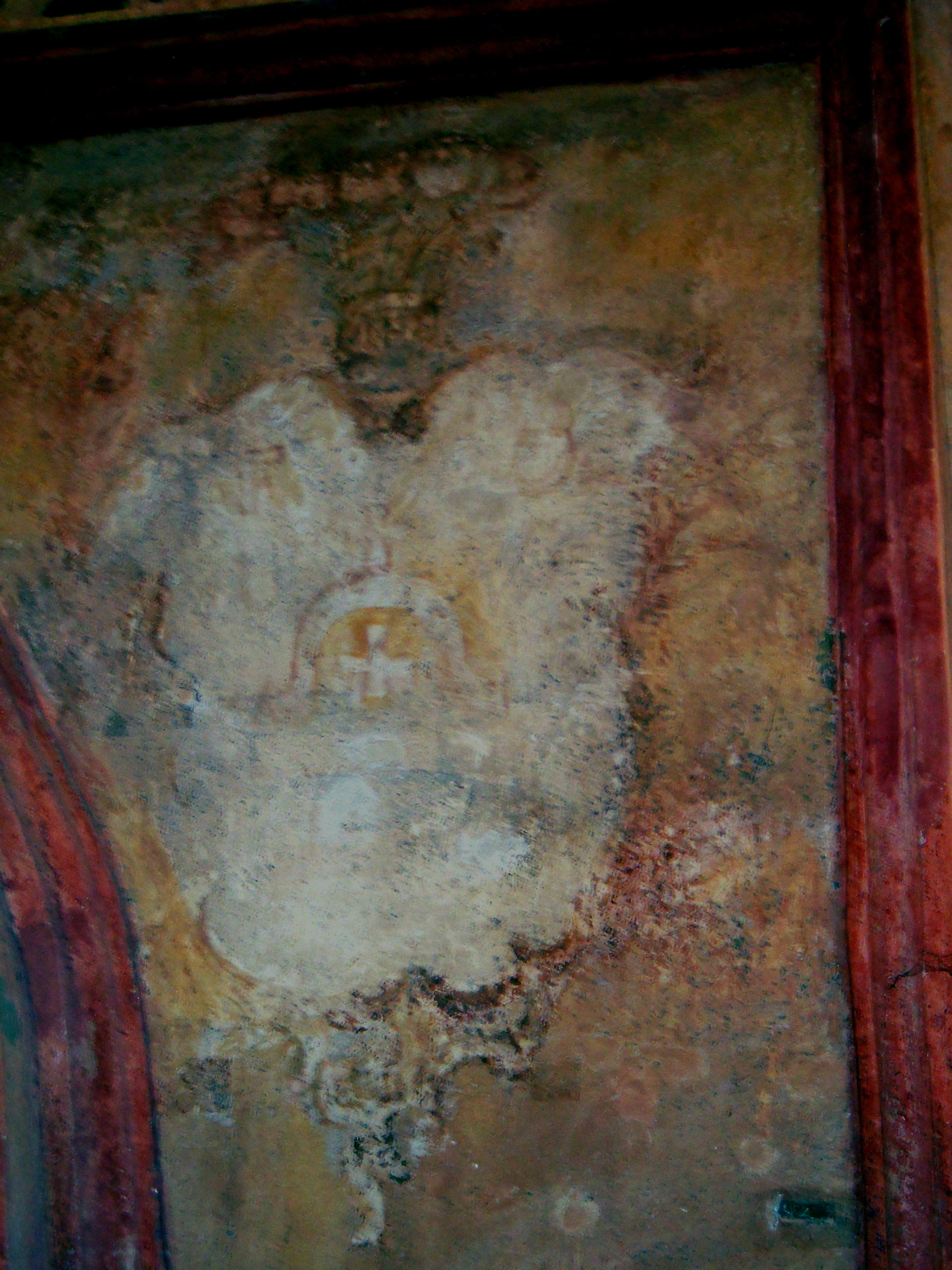 Герб Любич в каплице святого Антония Могилёвского кафедрального костёла Успения Пресвятой Богородицы (святого Станислава) (1752 г.)